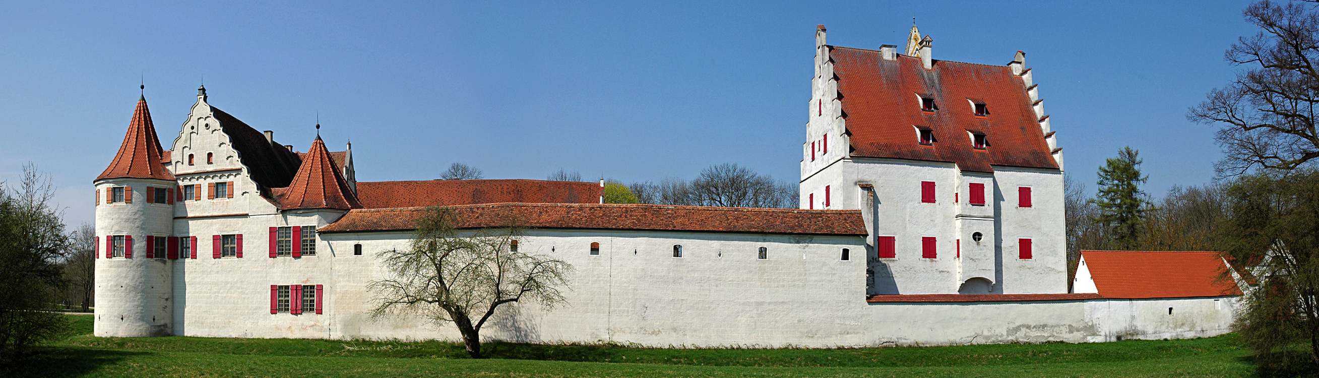 Schloss Grünau Jagdschloss Grünau bei Neuburg an der Donau Panorama mit 3 Fotos